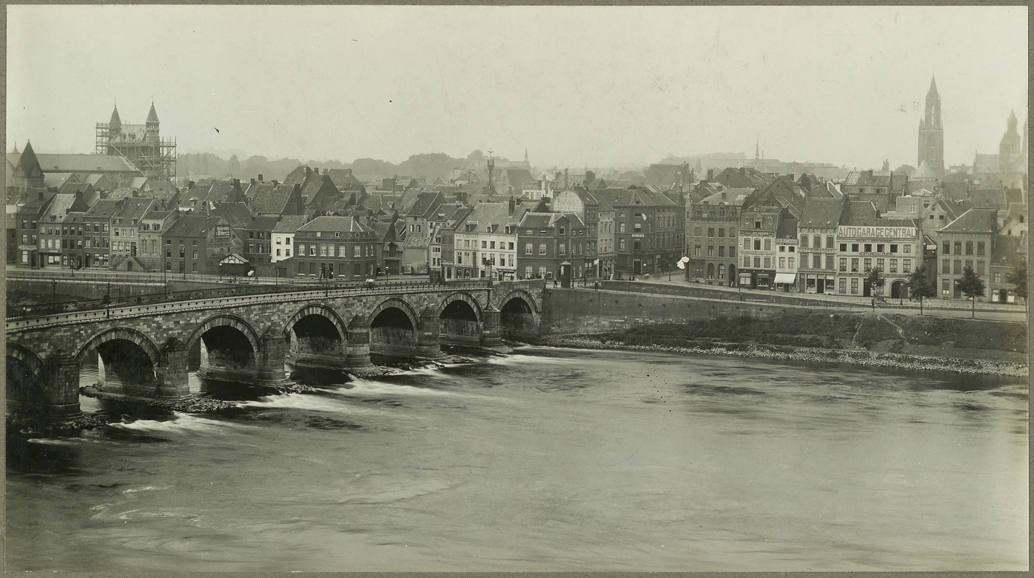 Maasbrug: Zicht op brug en stad